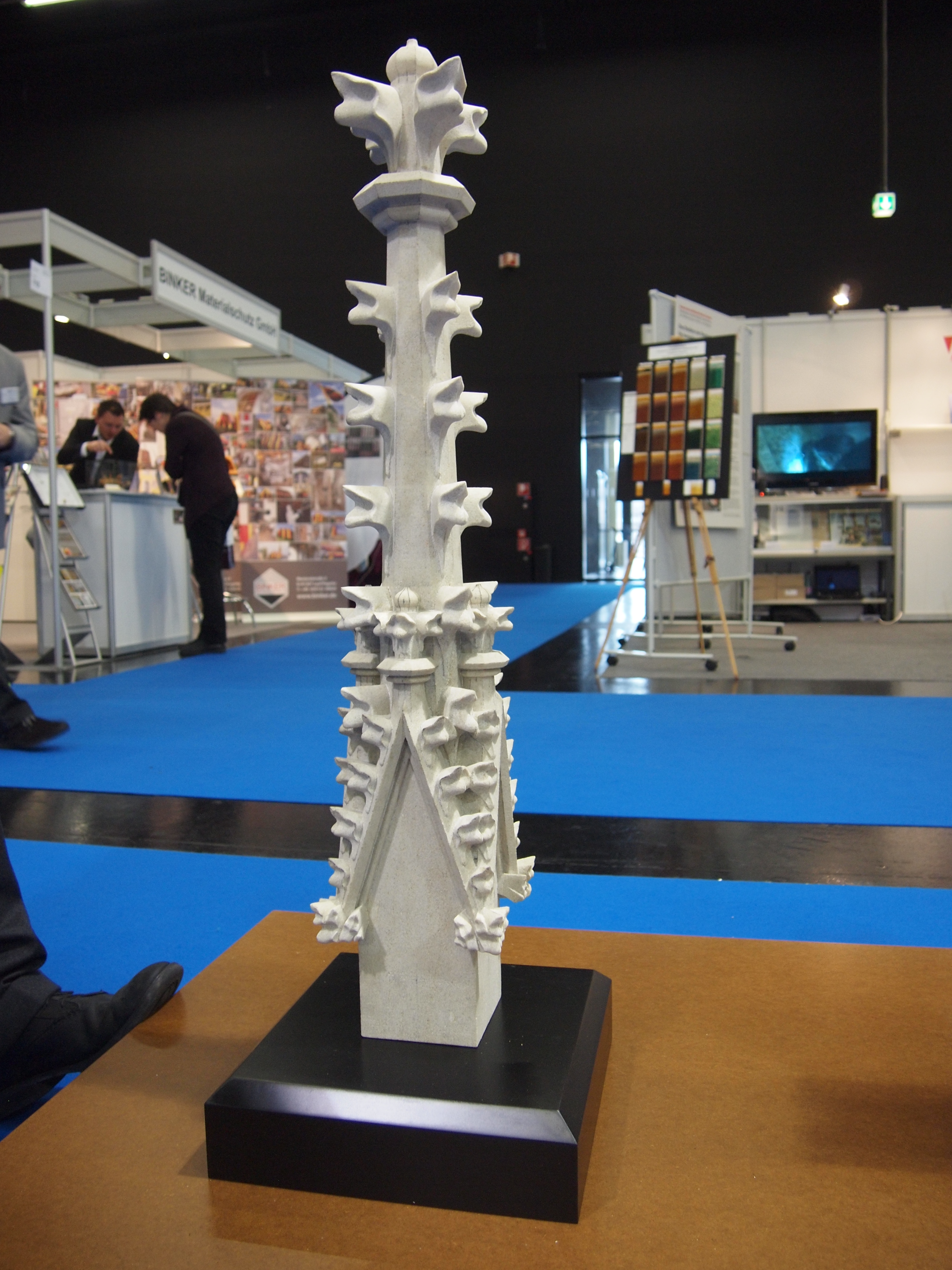 fertig behauene Fiale der Südhaus-Querfassade des Kölner Doms, ausgestellt auf der Monumento 2014, Stand d. BLfD. Leihgabe der Dombauhütte der Hohen Domkirche Köln